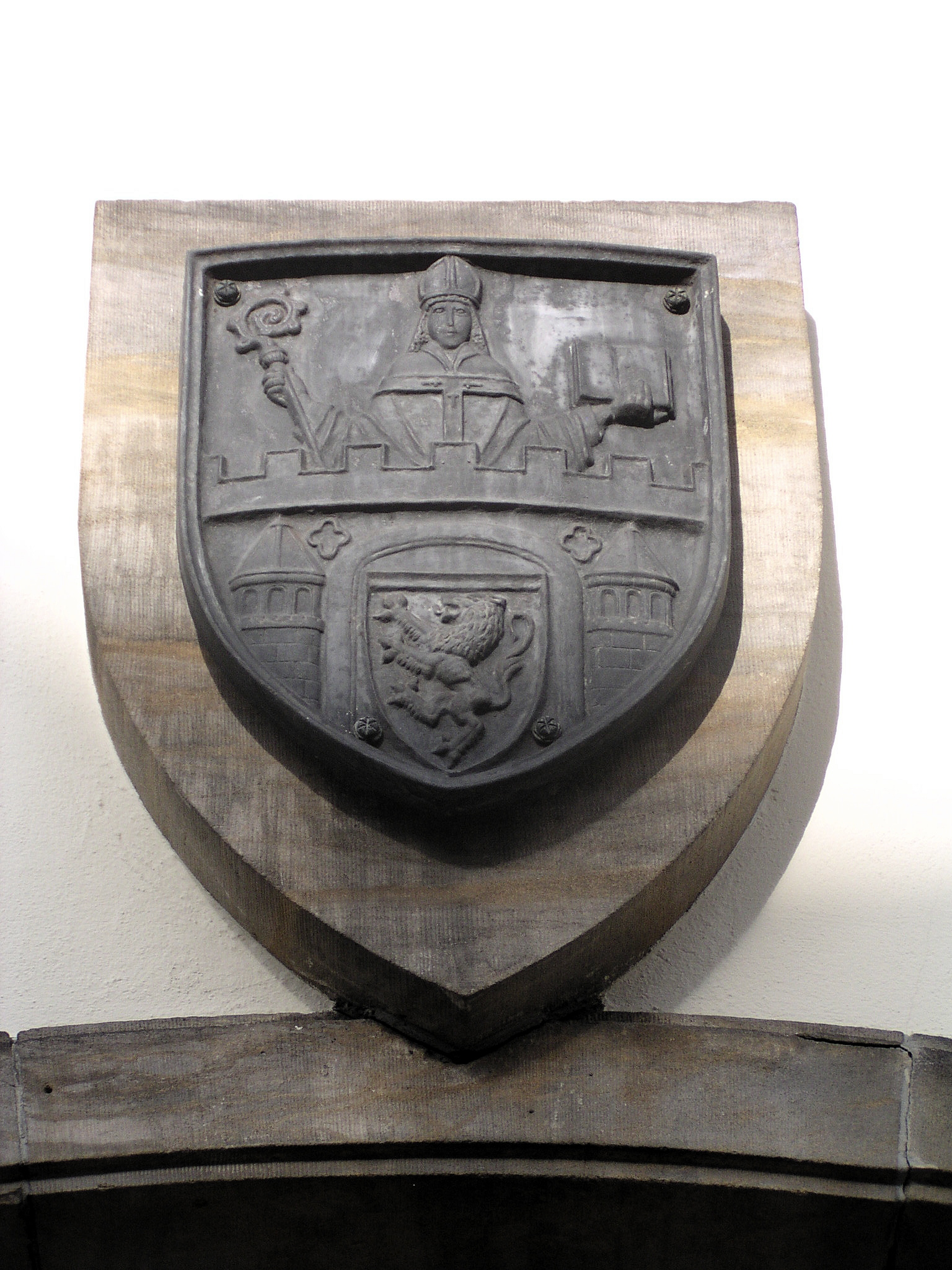 In Metall gegossenes Stadtwappen über dem Haupteingang des Rathauses von Siegen in Westfalen